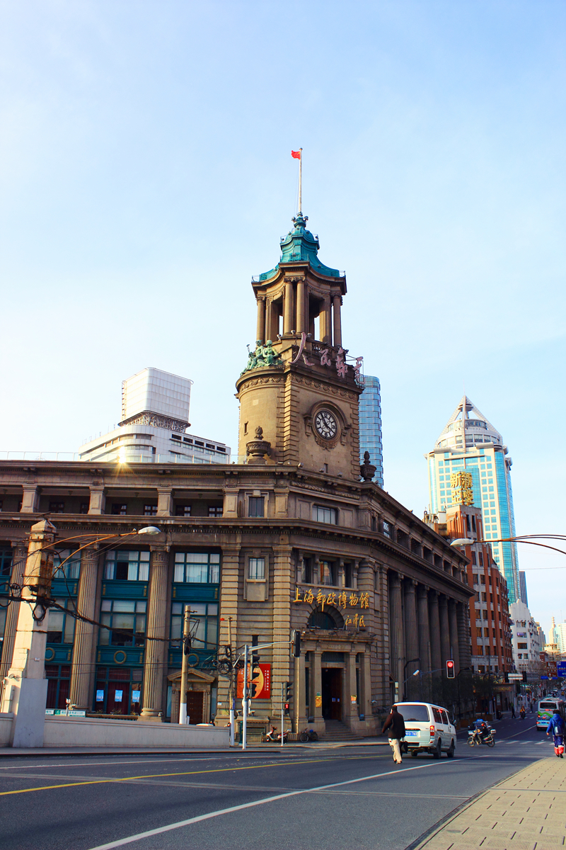 上海邮政总局正门